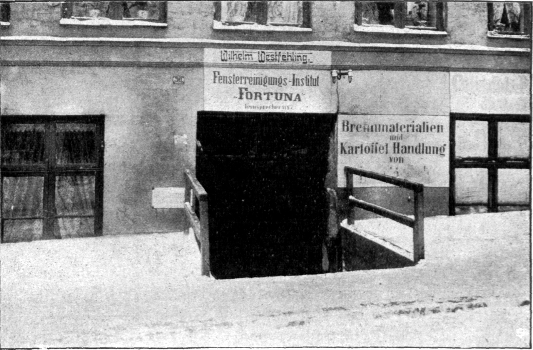 Das Haus ‚Engelsgrube 20’ nach der Straßenregulierung